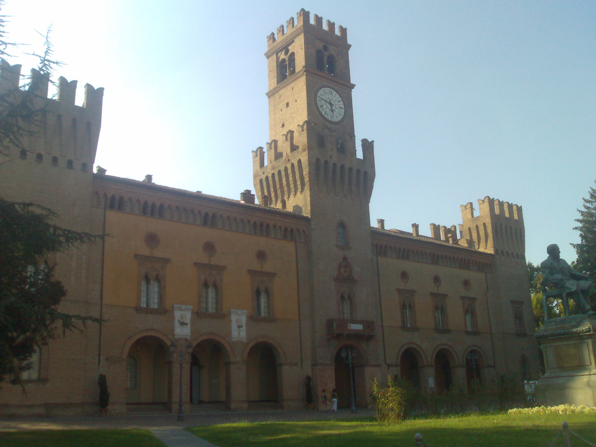 scorcio della rocca pallavicino